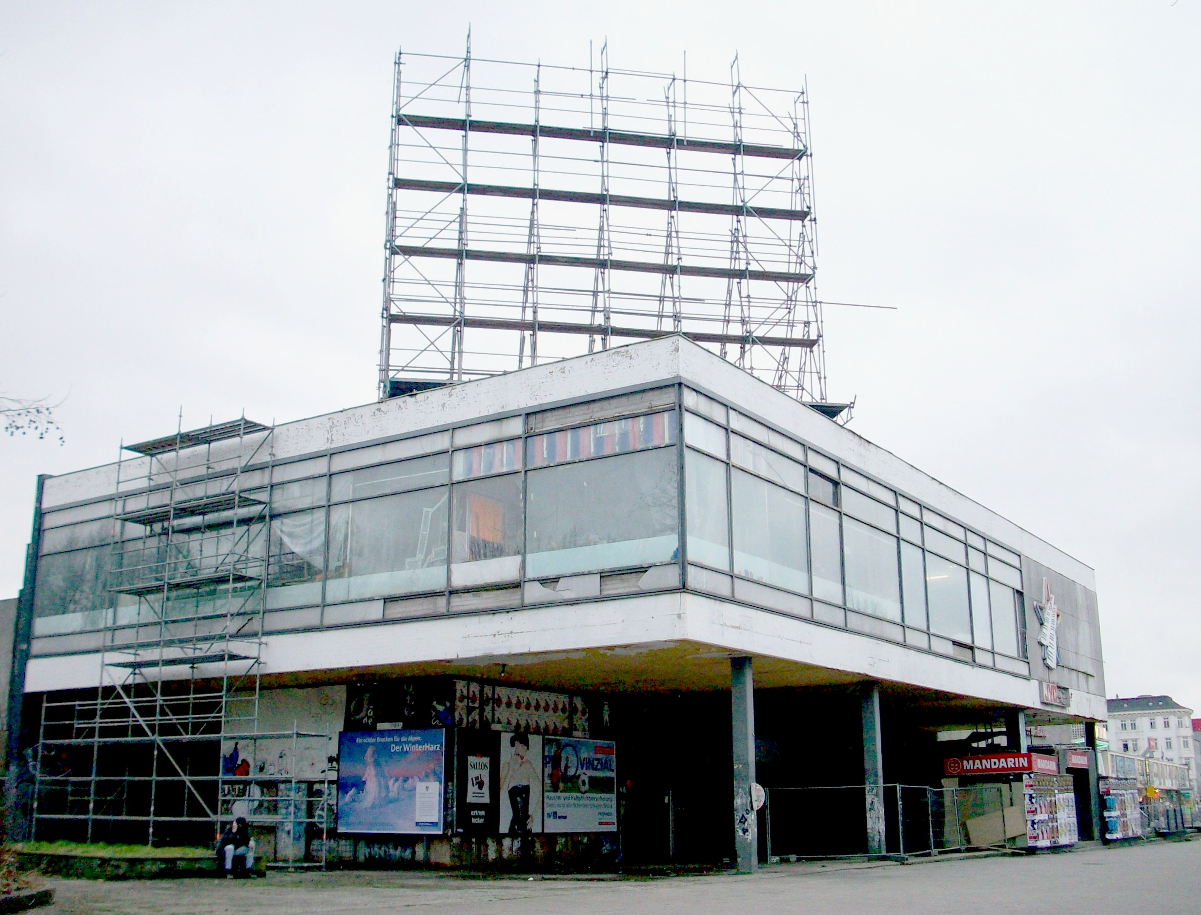 Reeperbahn 1, Hamburg-St. Pauli: Ehemaliges Bowlingcenter aus den 1960/70ern. 1991 — 2003 Standort des Mojo Club, ab 2004 des "Mandarin Kasino". Des Weiteren befanden sich hier die Ateliere der "Ateliergemeinschaft S.K.A.M. e.V.". Das Gebäude ist inzwischen abgebrochen worden